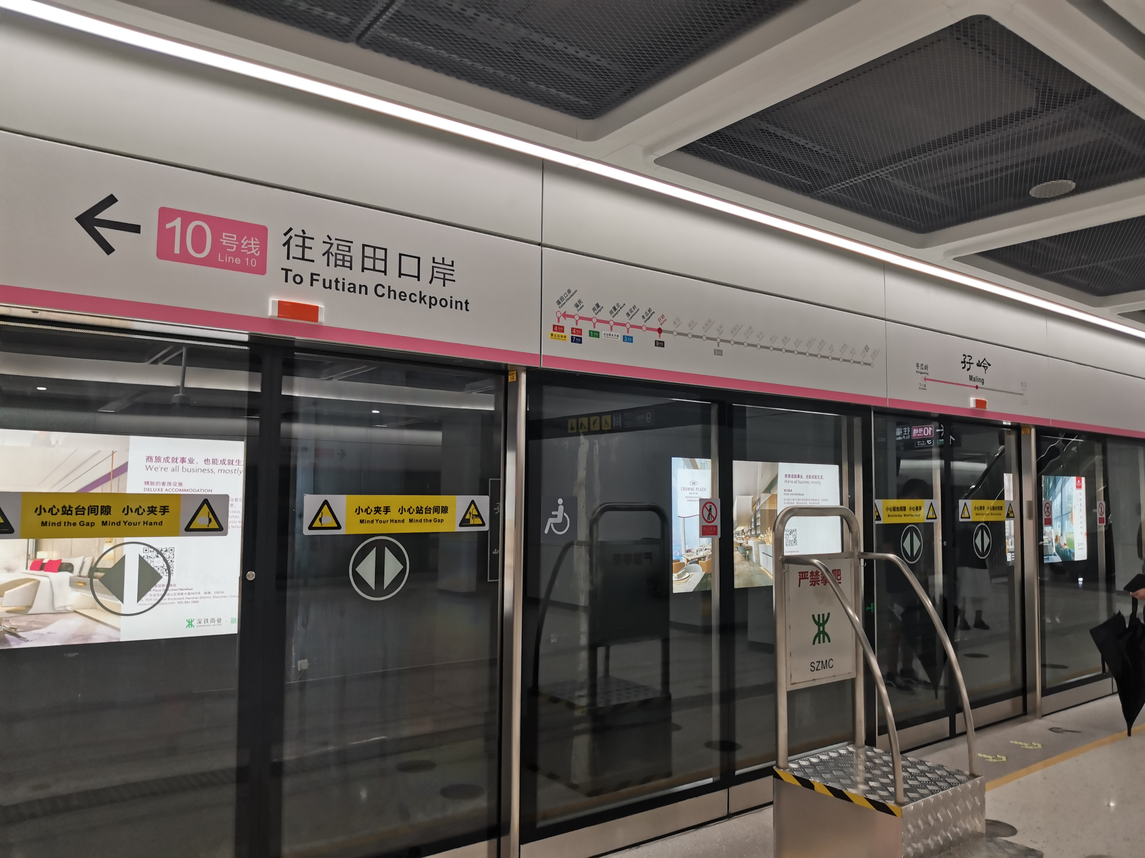 深圳地铁10号线孖岭站月台